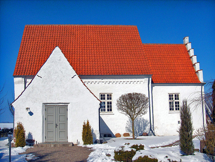 fra syd